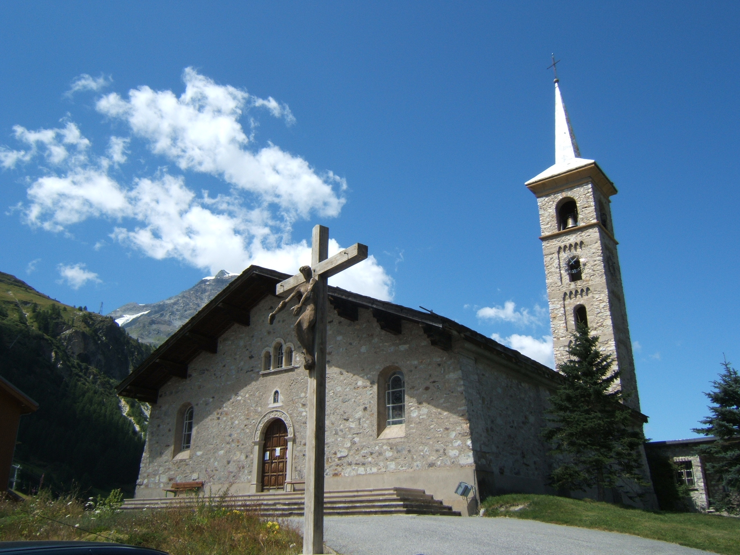 L'église Saint-Jacques et le calvaire des Boisses à Tignes, en Savoie, près du barrage.